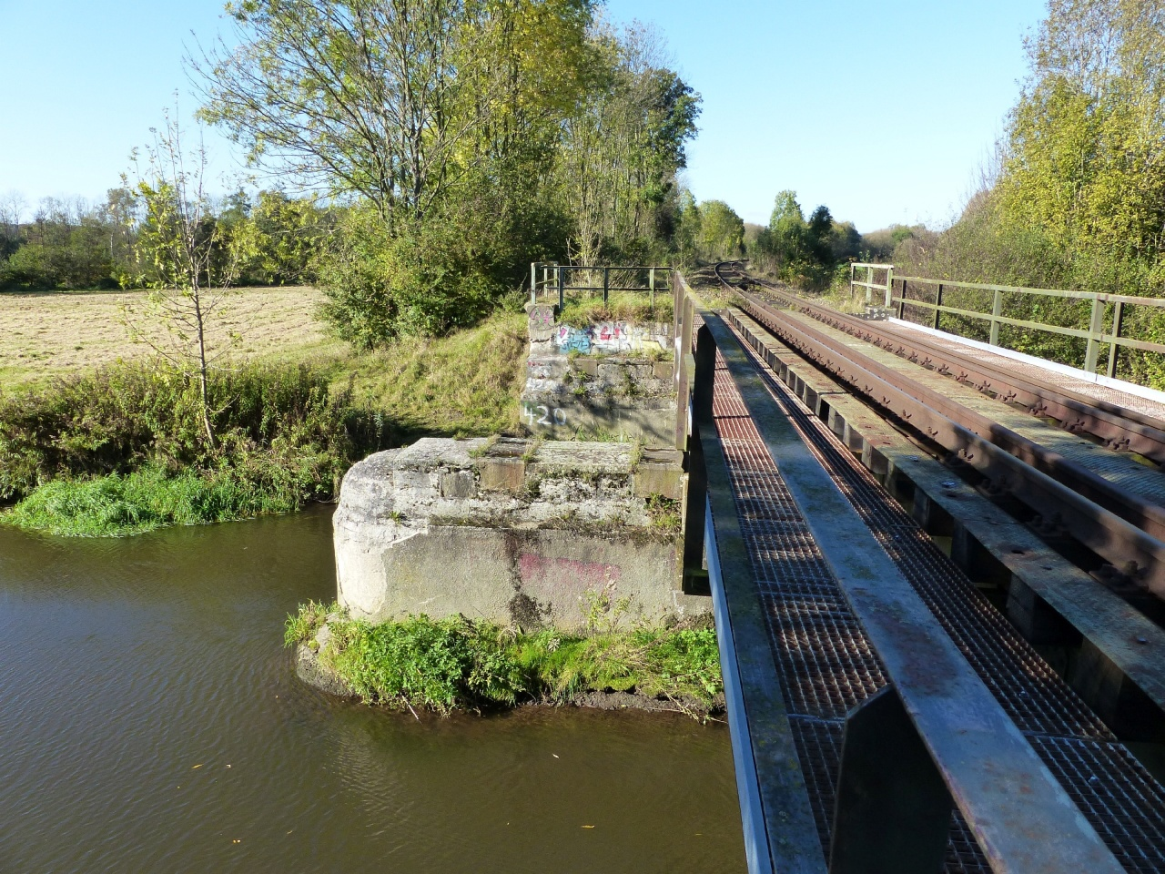 Okerbrücke der Bahnstrecke Wolfenbüttel-Schöppenstedt bei Wolfenbüttel-Linden, Blickrichtung Westen.